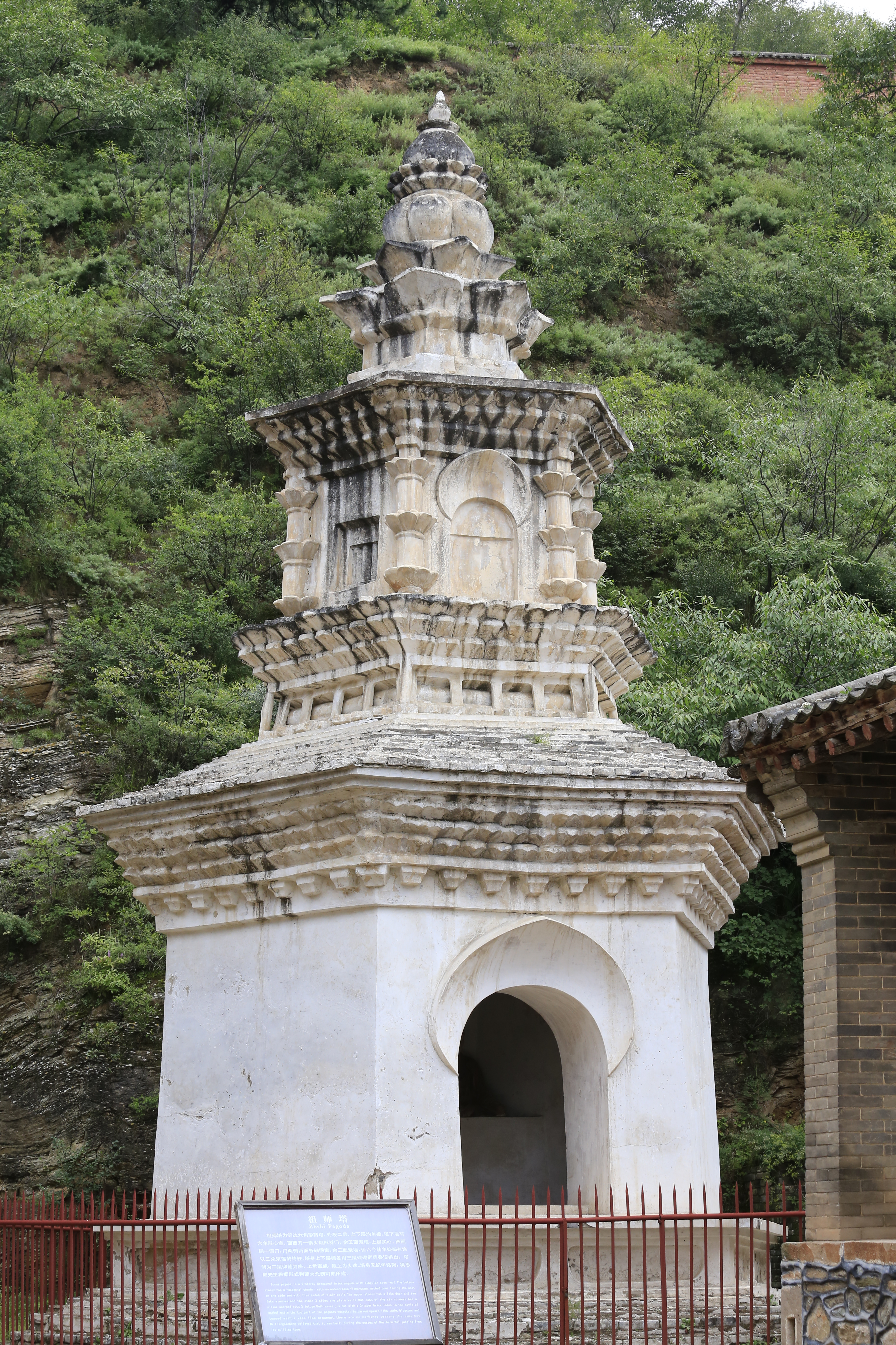 五台佛光寺—— 祖师塔